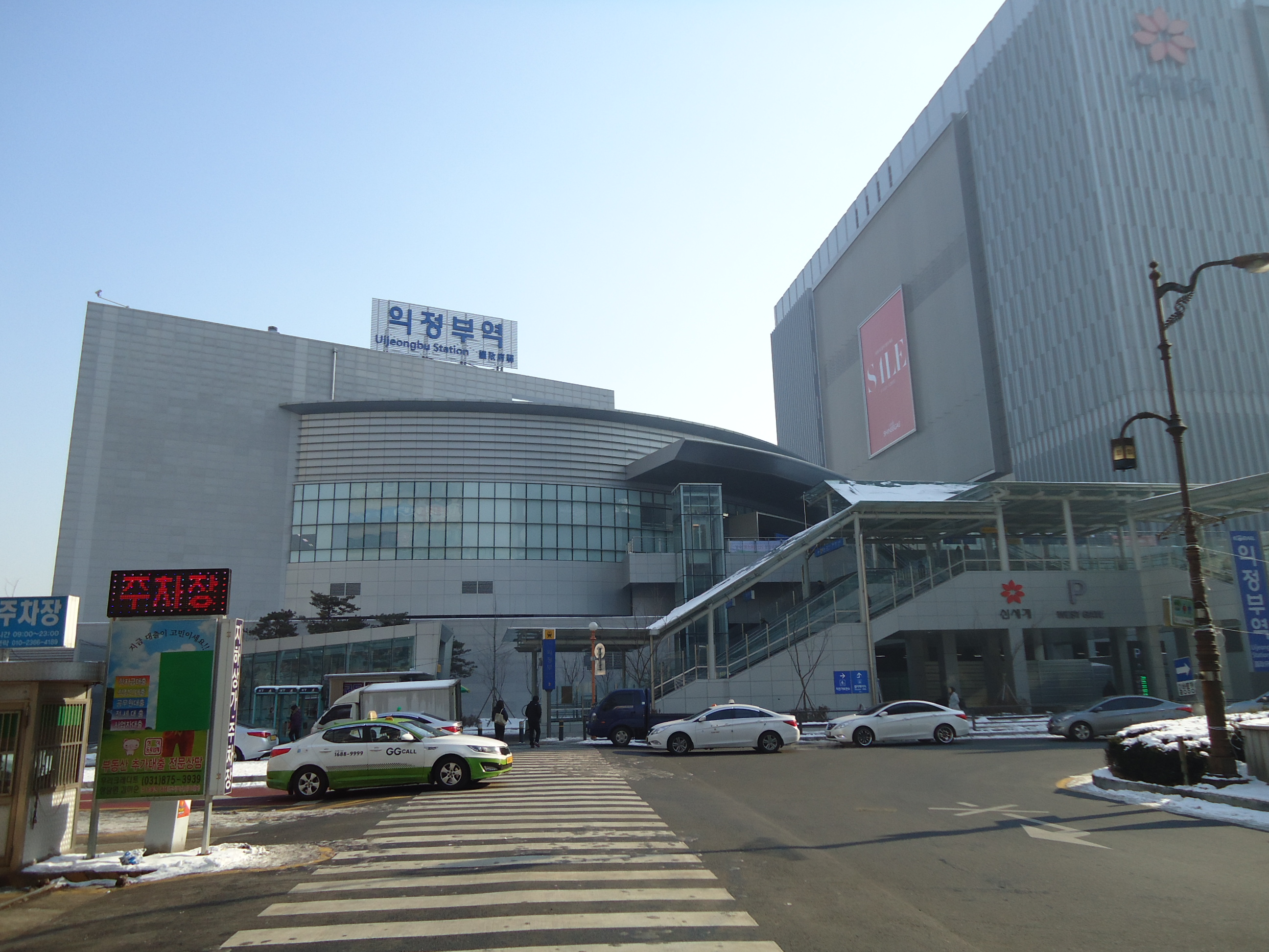 의정부역 전경